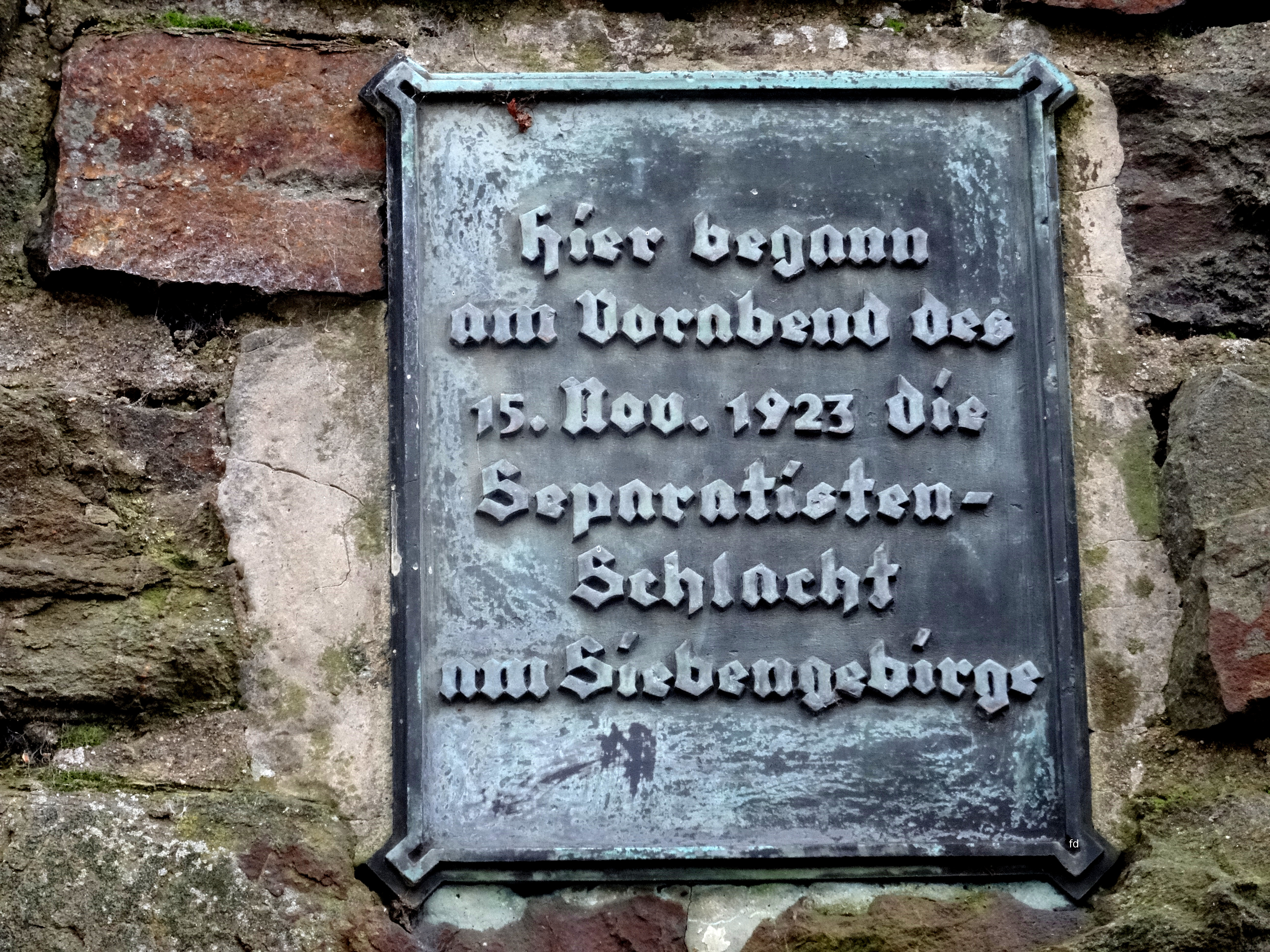 Hinweistafel auf dem Gedenkstein an der Leonarduskapelle in Rheinbreitbach.